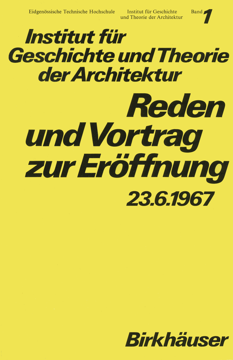 Book cover of Reden und Vortrag zur Eröffnung (Opening Speeches and Lecture)